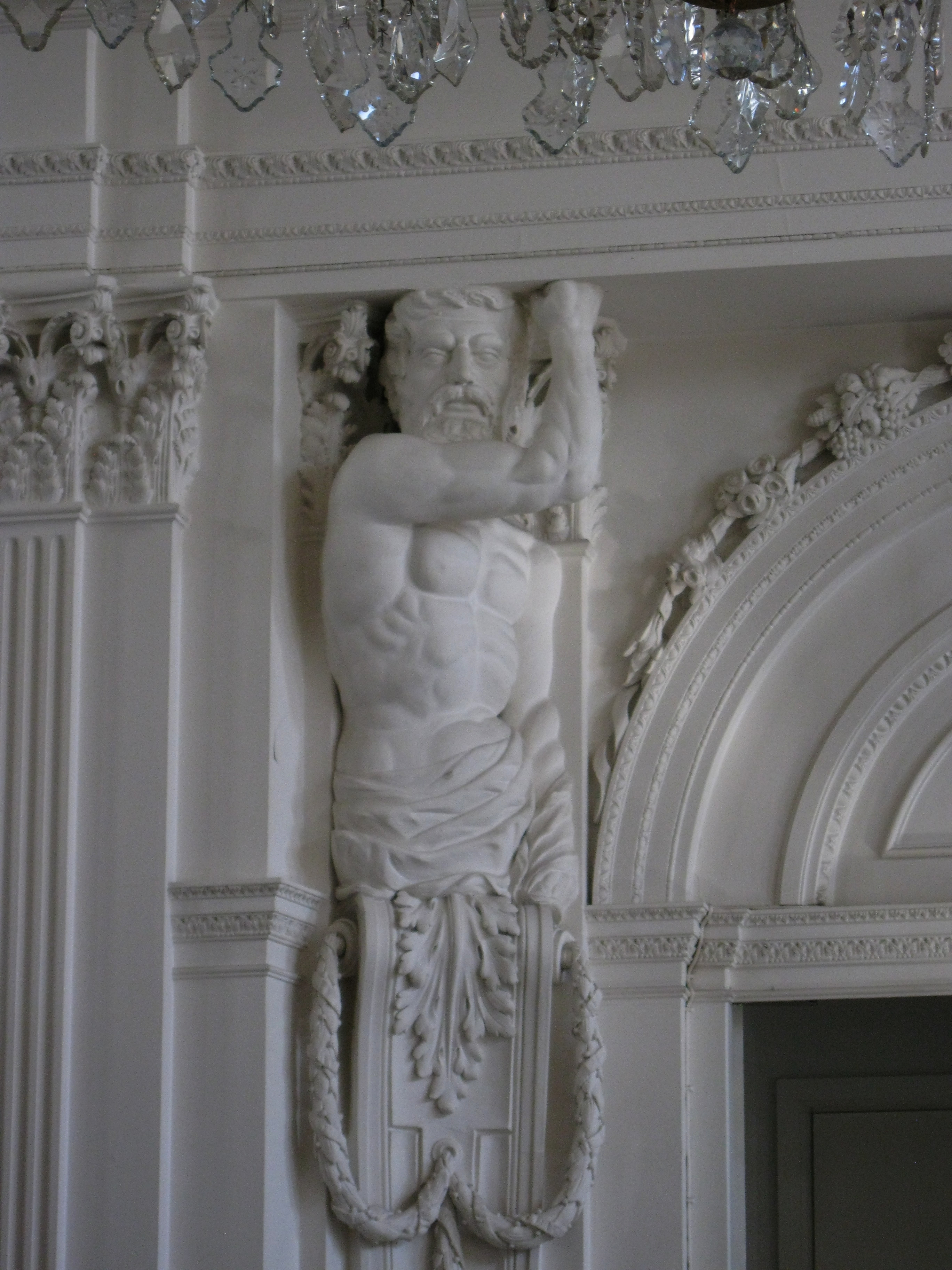 Atlasfigur am Eingang zum Ballsaal im Alten Kurhaus in Aachen